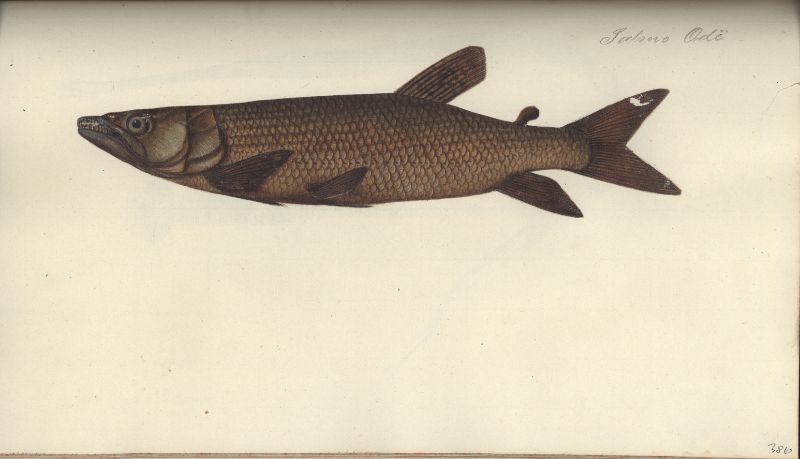 Afrikanischer Hechtsalmler (Hepsetus odoe)